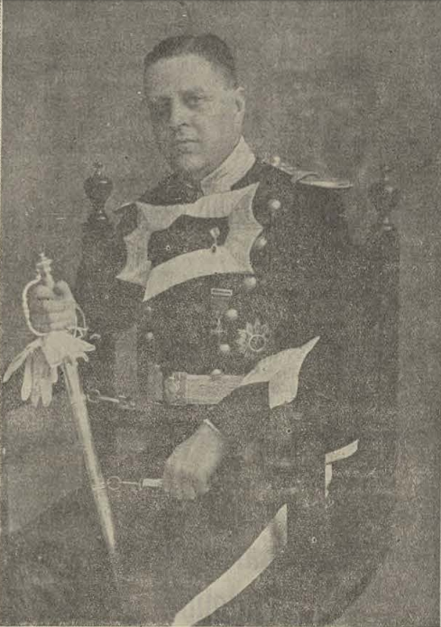 Jefe delegado de la Comunión Tradicionalista